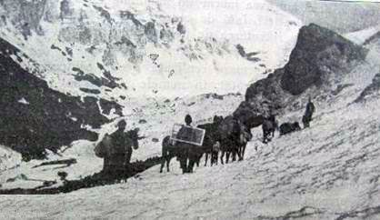 Spre Casa Omu